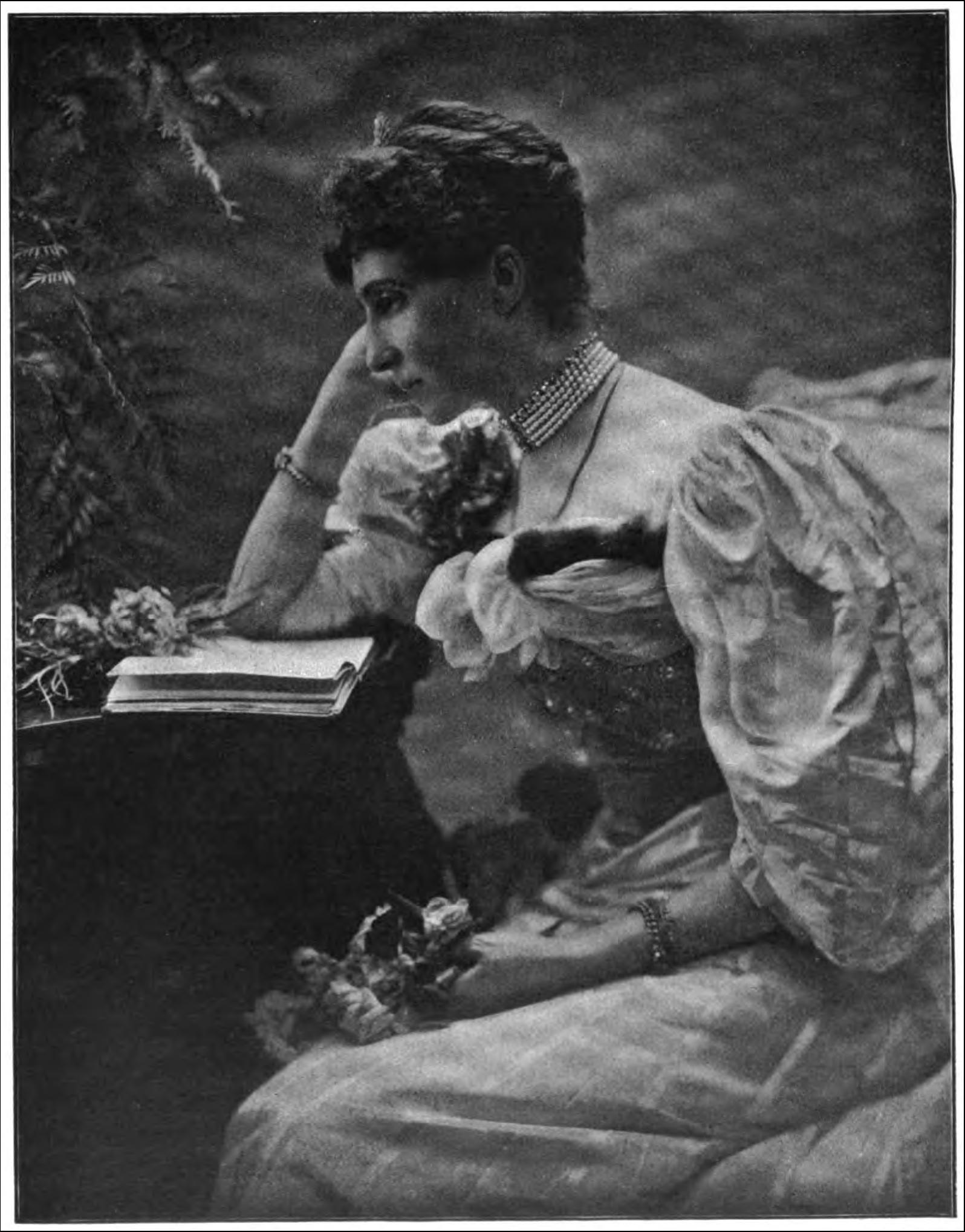 Marie Therese von Portugal, nach einer Fotografie von H.S. Mendelssohn in London.